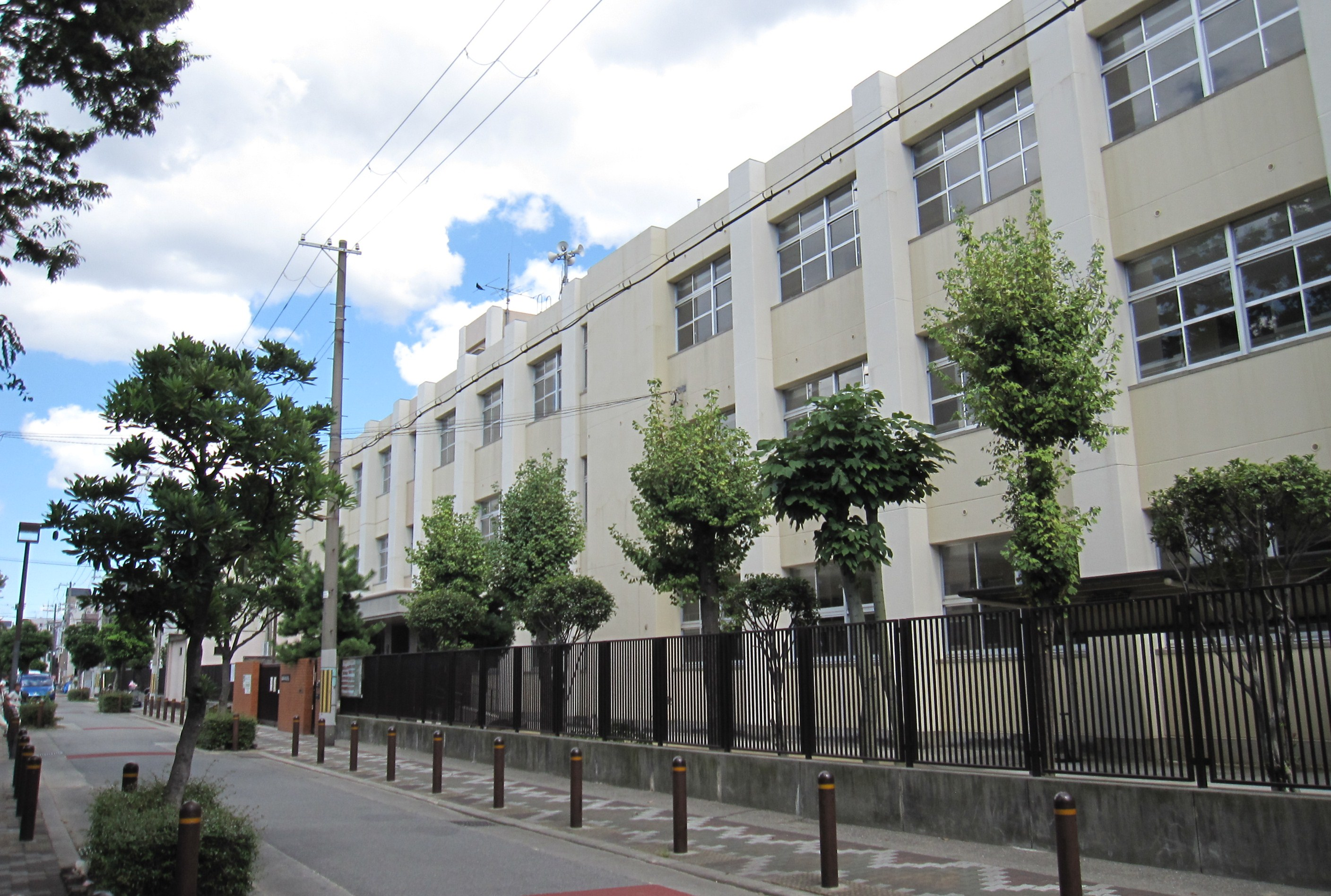 大阪市立平尾小学校